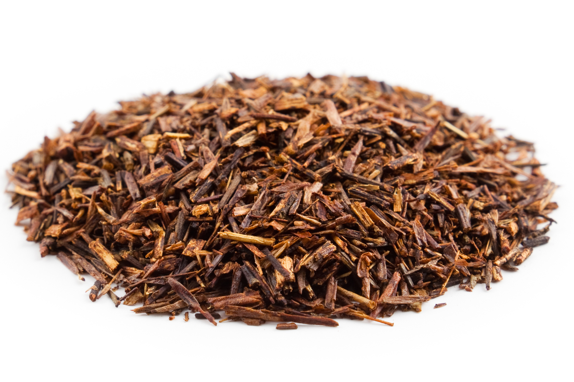 purer geschnittener Rooibos